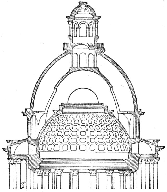 Coupe du dôme du Panthéon de Paris